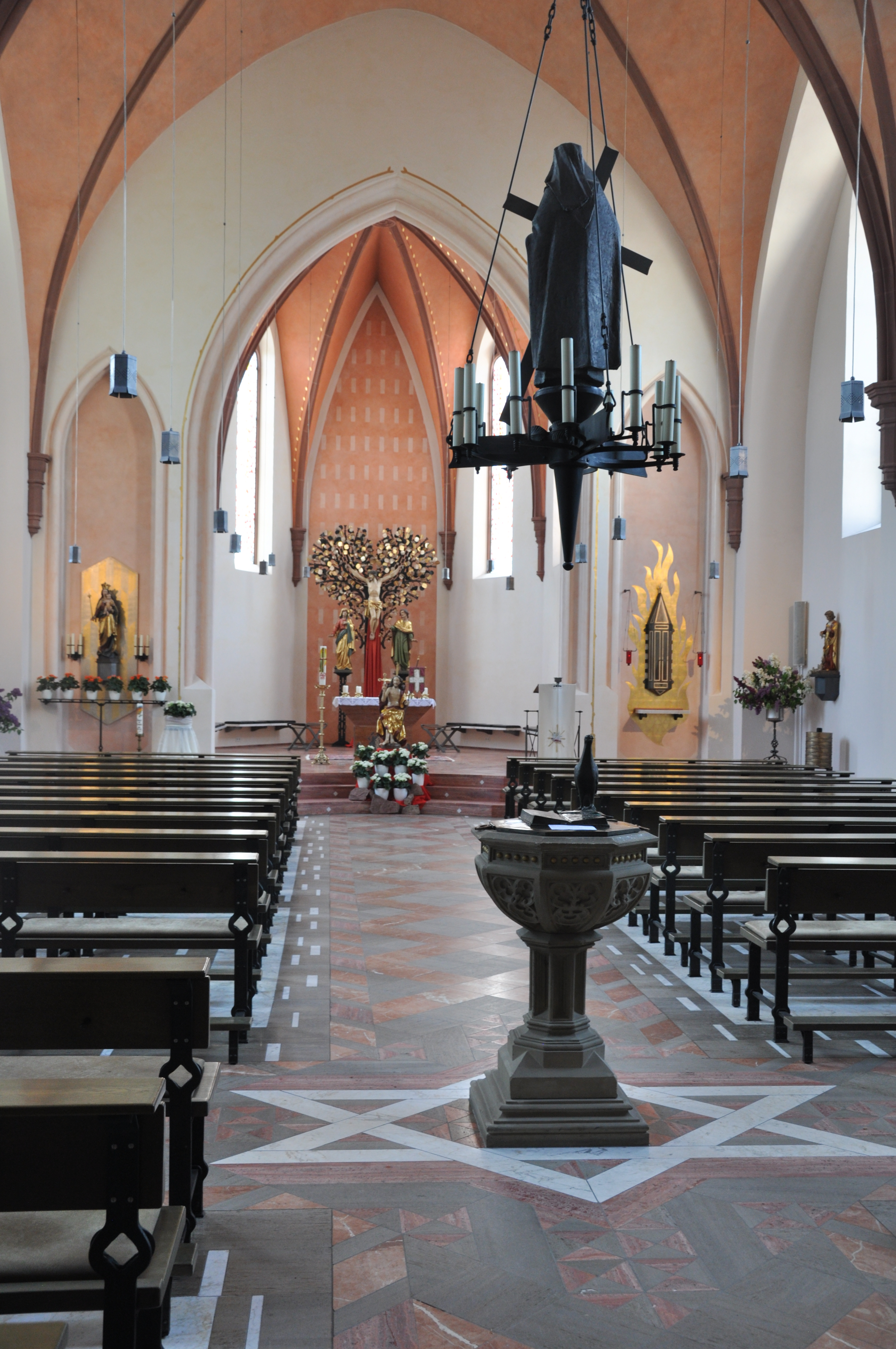 Bad Bergzabern, Kath. Pfarrkirche St. Martin, Blick zum Chor, im Vordergrund der Taufstein Edith Steins